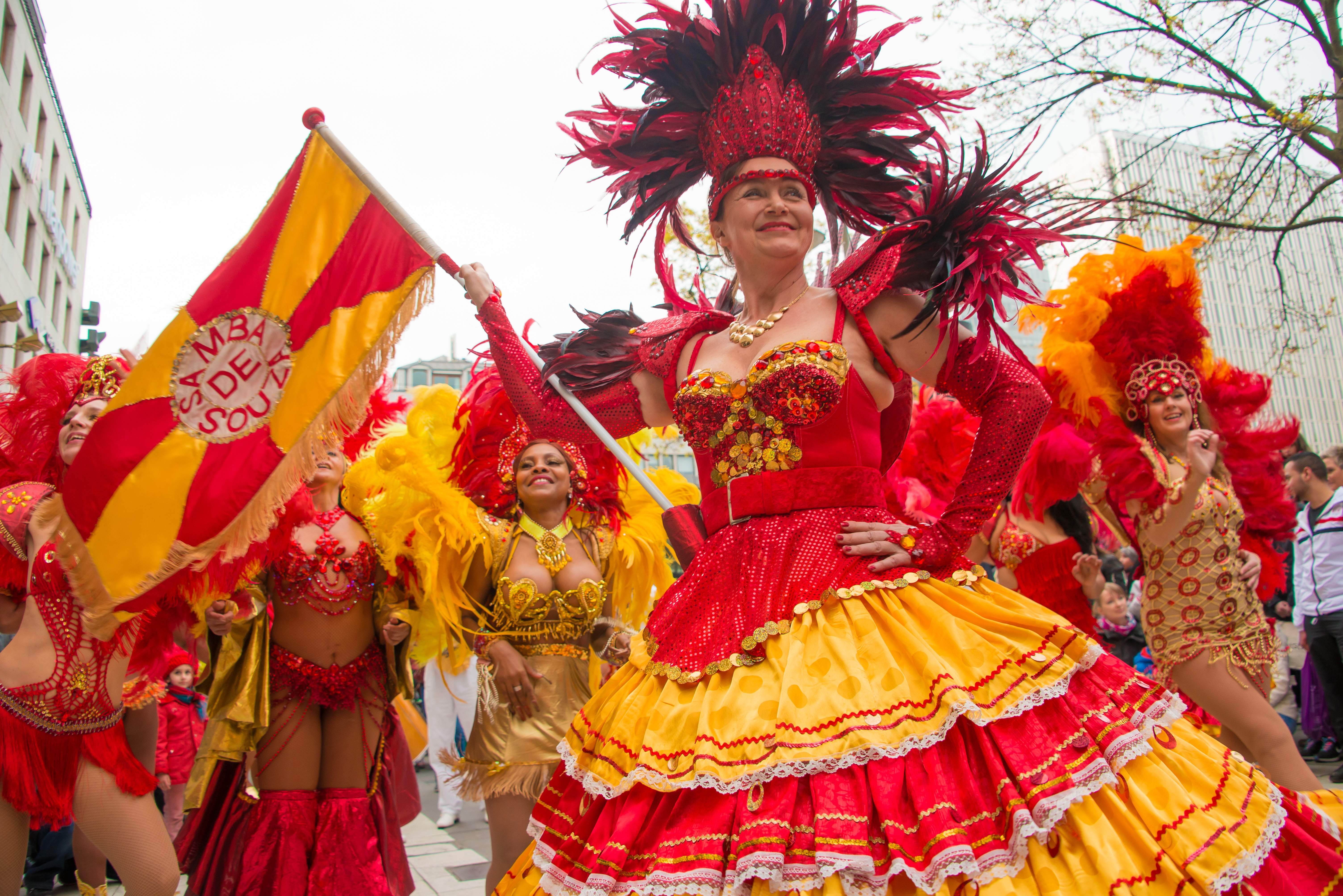 Karnevalståg från Sergels torg under Kulturnatten i Stockholm den 25 april 2015.